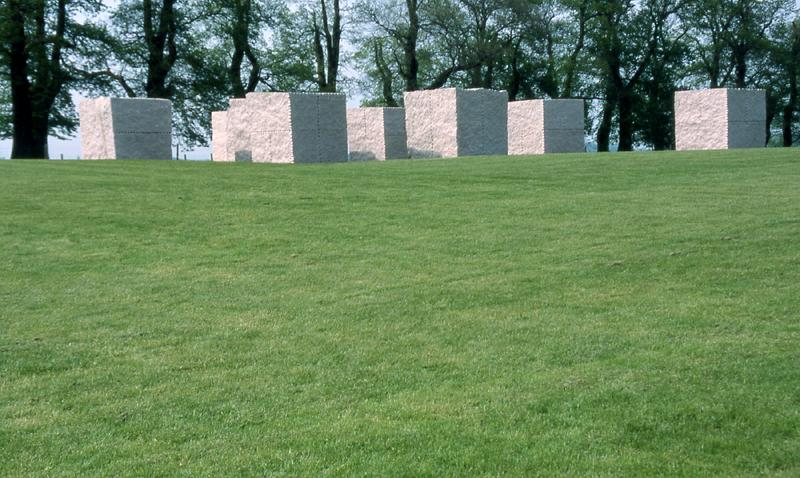 Beschreibung: Ulrich Rückriem: Variationen eines Blocks, Schloss Dyk bei Mönchengladbach Datum: fotografiert 2003 Fotograf: Hans Peter Schaefer Lizenz